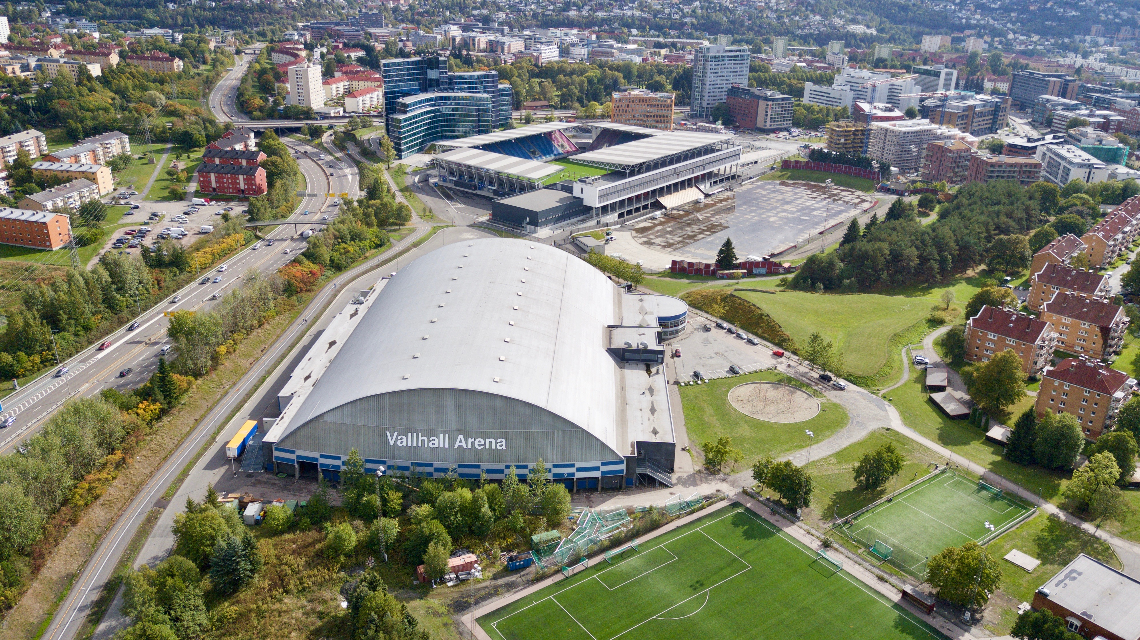 Vallhall Arena og Intility Arena, Oslo.